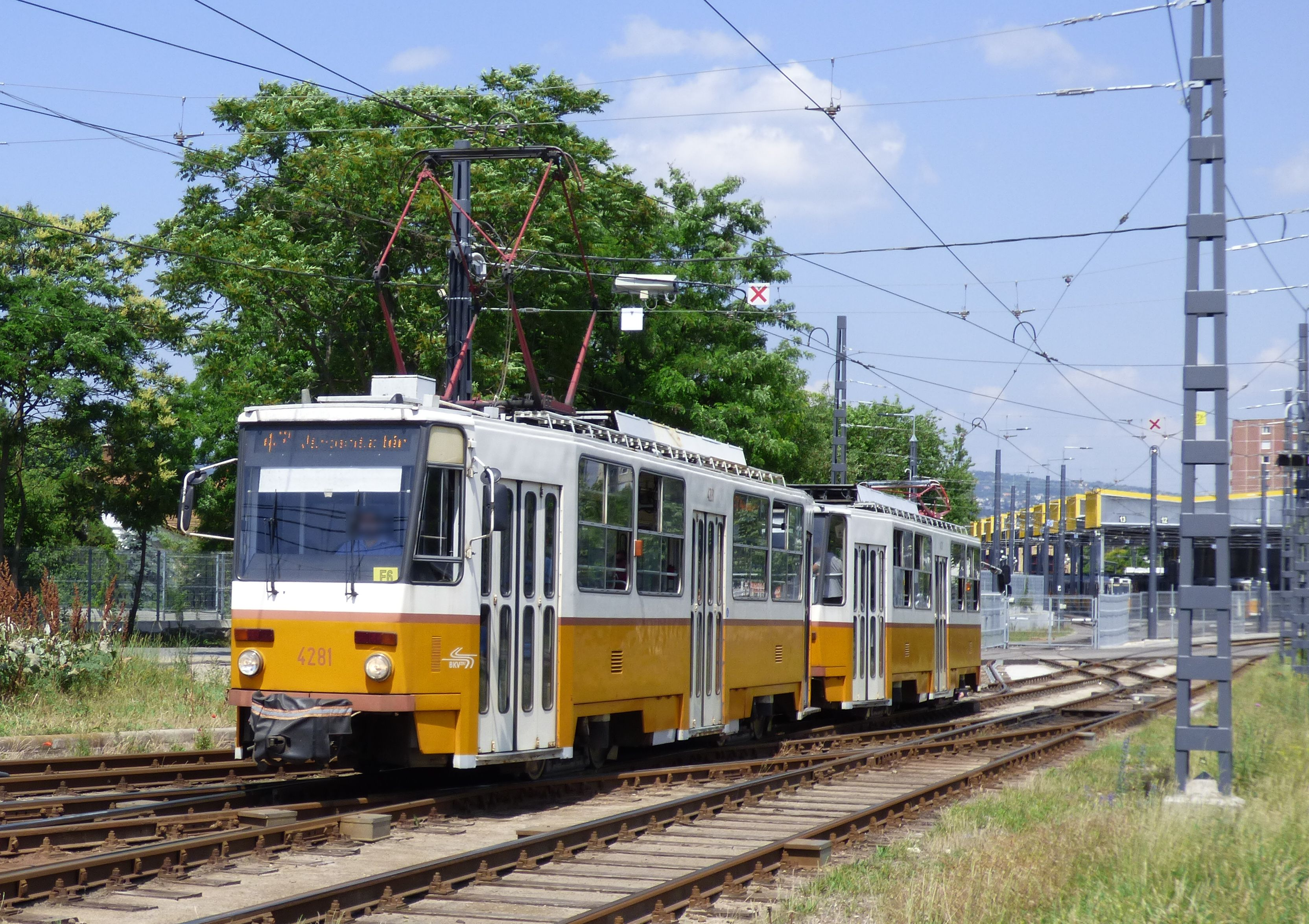 47-es jelzésű Tatra T5C5 villamos a Budafok kocsiszínnél (psz. 4281)